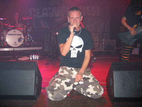 Clawfinger in der Saarbrücker Garage im Rahmen ihrer Hate Yourself With Style-Tour am 20. Februar 2006